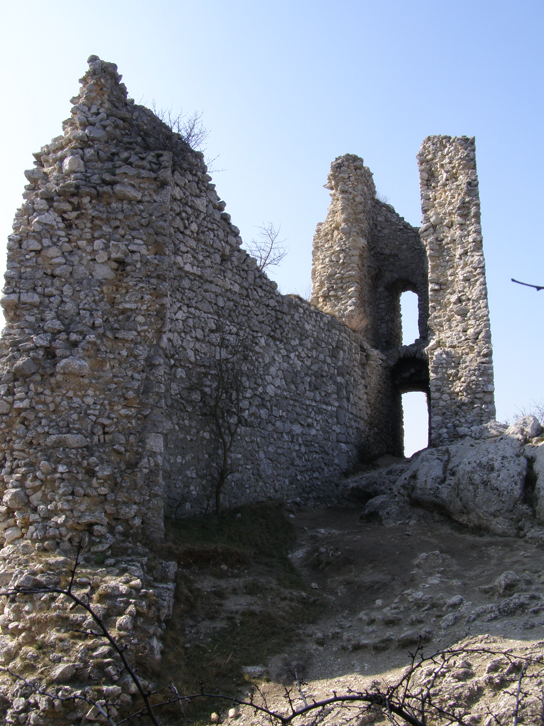 Pavlovské vrchy: Sirotčí Hrádek, jižní část hradu (palác)